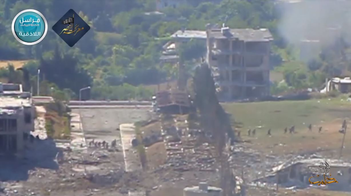 Soldats syriens fuyant l'hôpital de Jisr al-Choghour